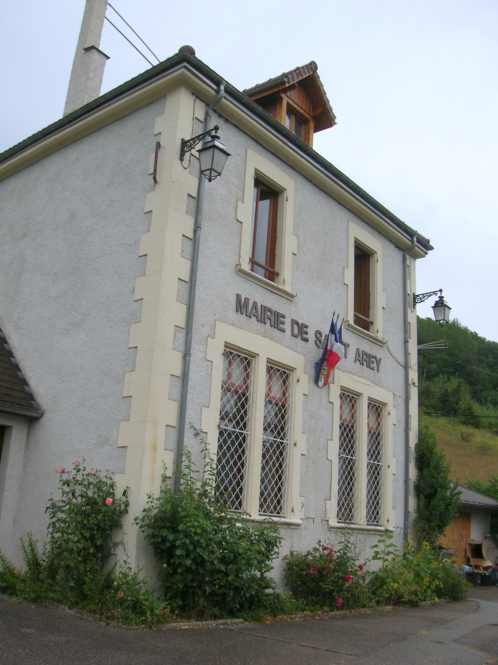 Saint-Arey (Isère), France.